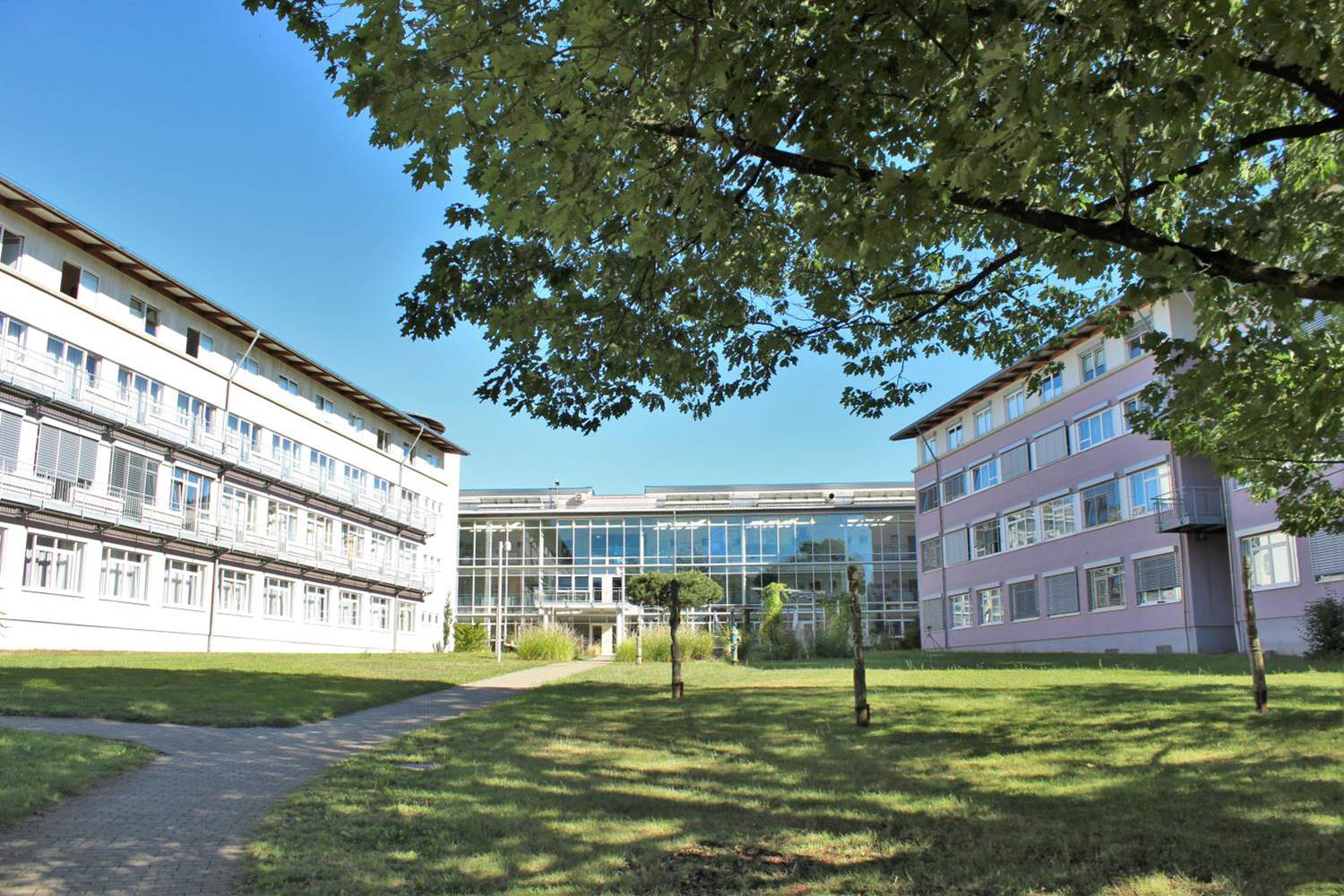 Gartenansicht des Sigma-Zentrums